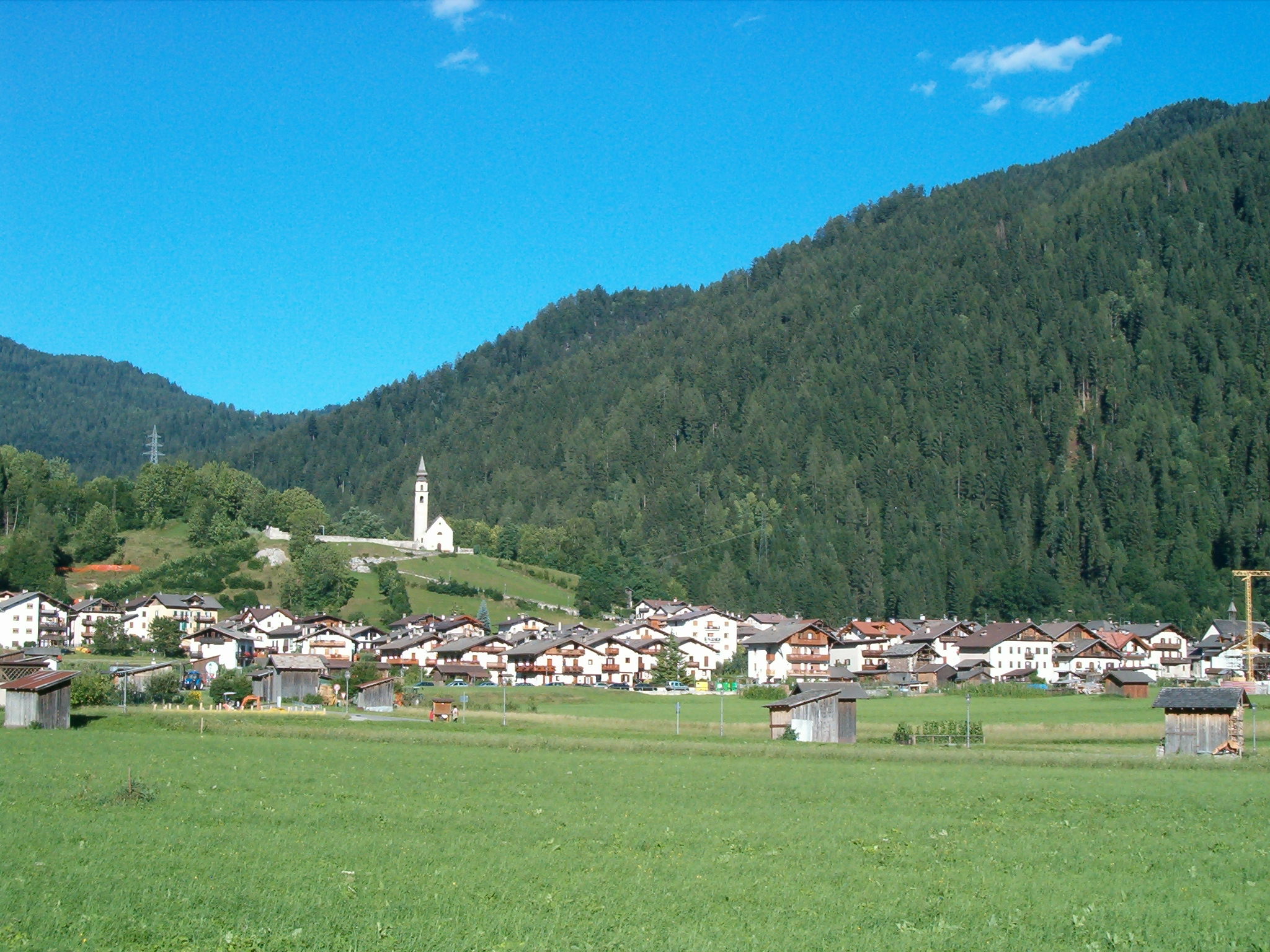 Tonadico, Trentino, Italy